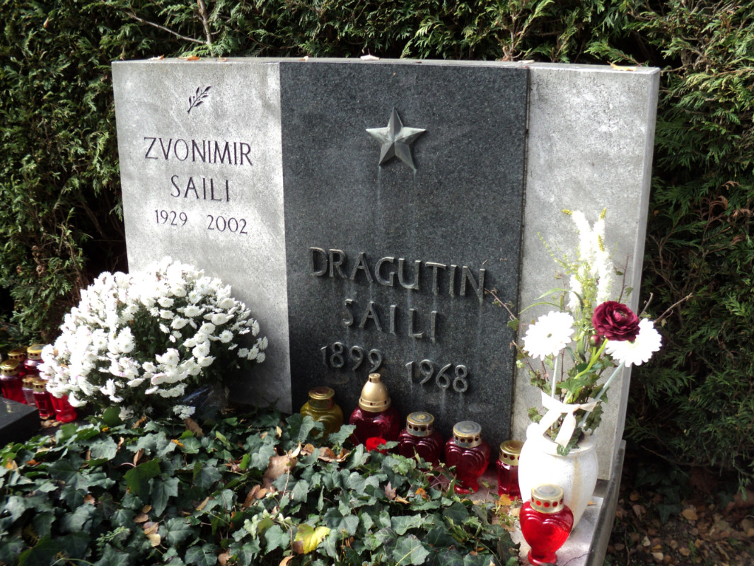 Grob Dragutina Sailija